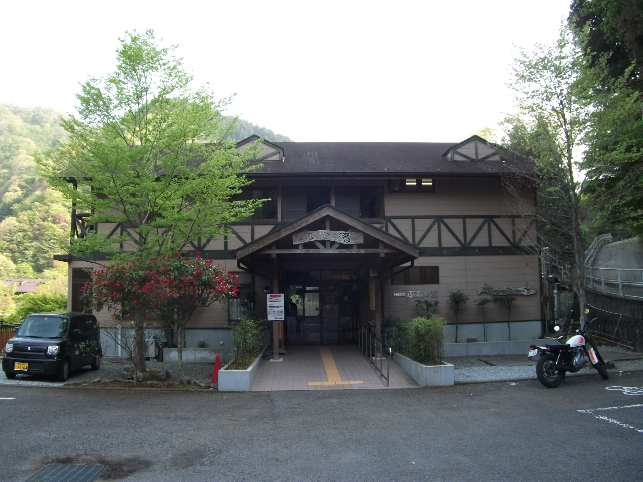 神奈川県山北町、中川温泉 町営日帰り温泉「ぶなの湯」